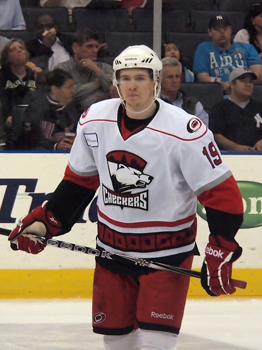 Zac Dalpe